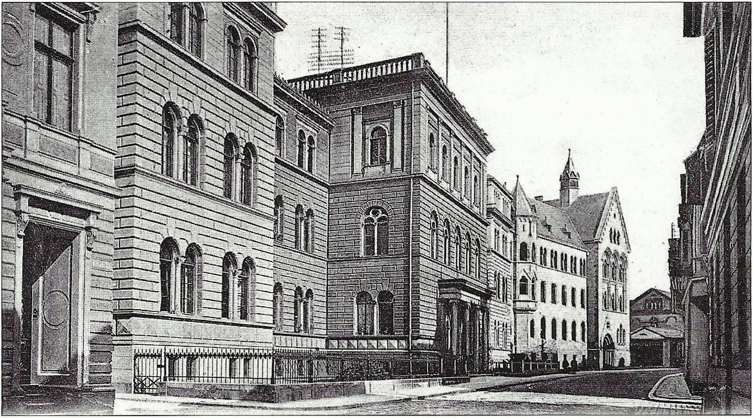 Gebäude des Landgerichts und Amtsgerichts Bonn, Wilhelmstraße, Bonn: Postkarte